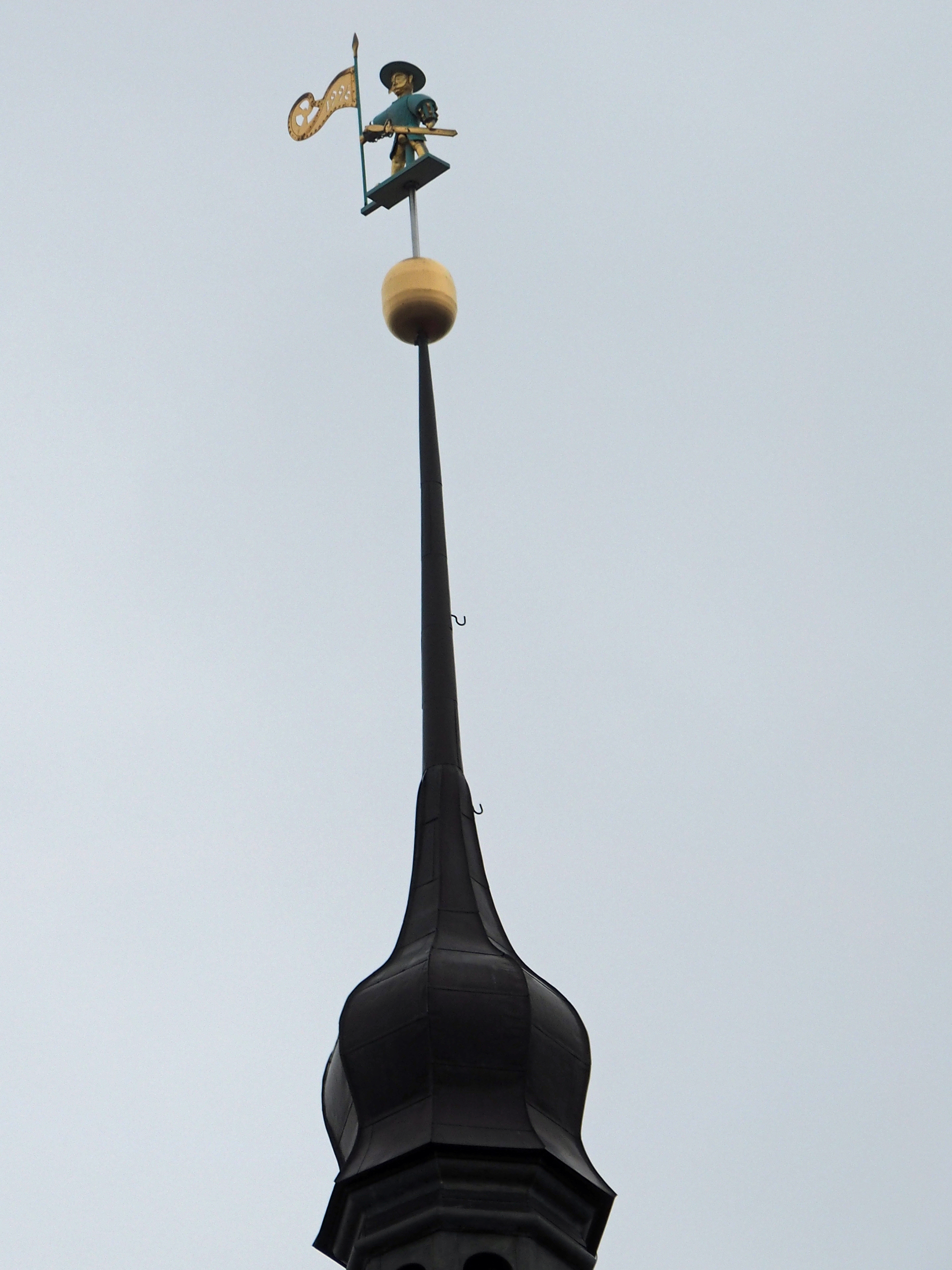 Landsknecht "Alter Thomas" Rathaus-Turmspitze